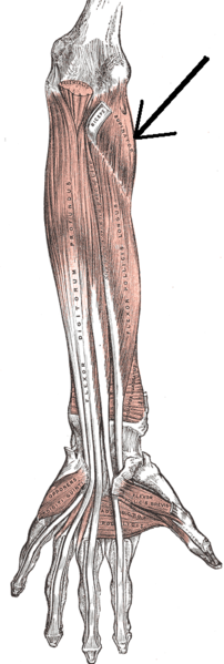 Orsócsonti csuklóhajlító izom